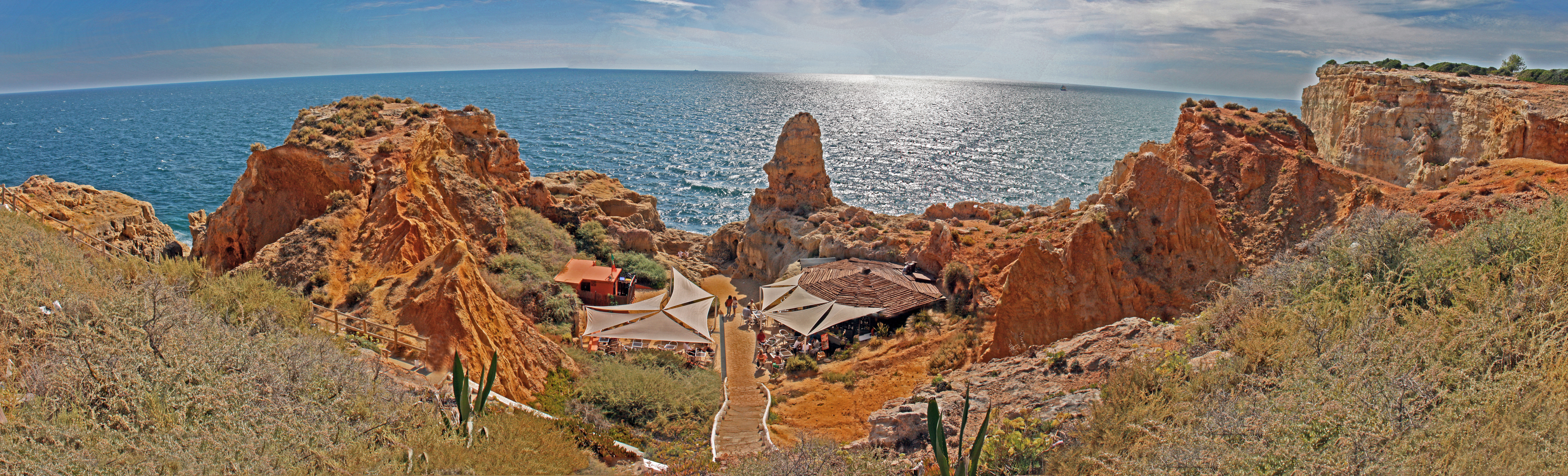 Algar Seco, Grotten, Algarve, Portugal